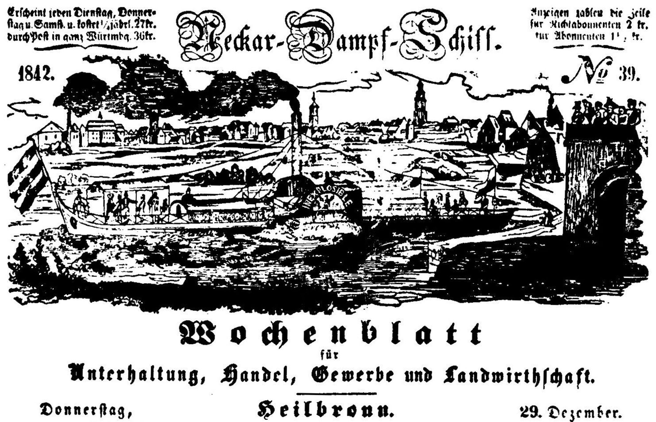 Titelkopf der Heilbronner Zeitung Neckar-Dampf-Schiff